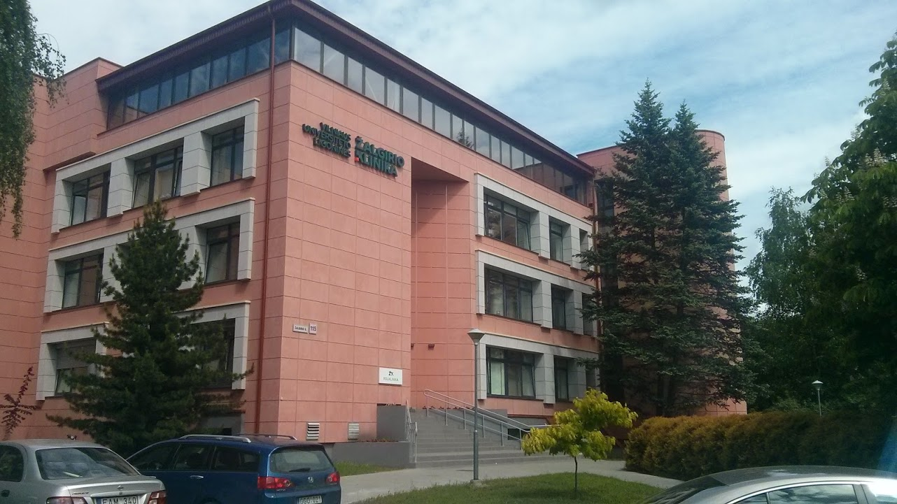 Vilniaus universiteto ligoninės Žalgirio klinika